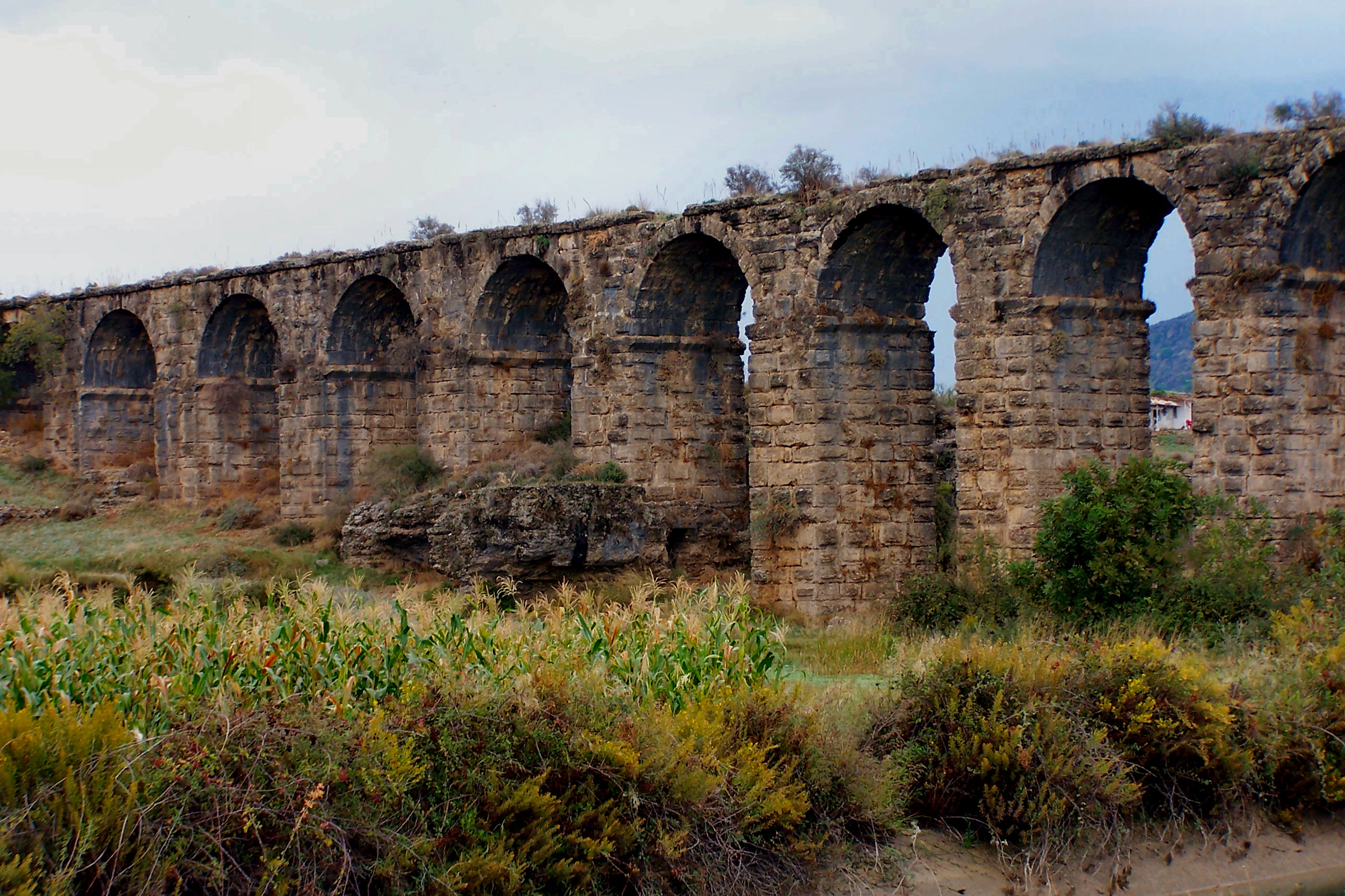 Aquädukt bei Aspendos(3)